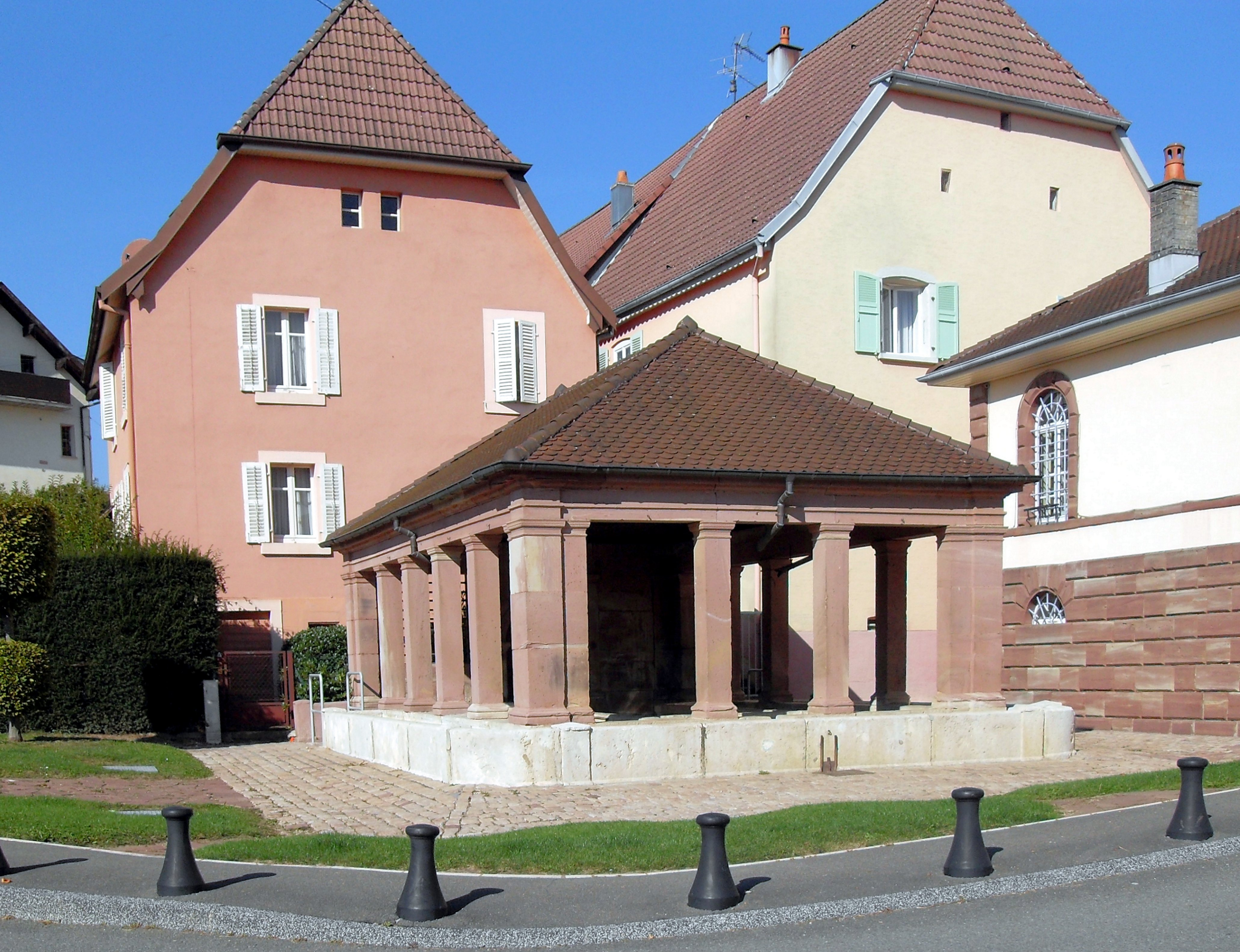 Le lavoir du corps de grande à Bourogne